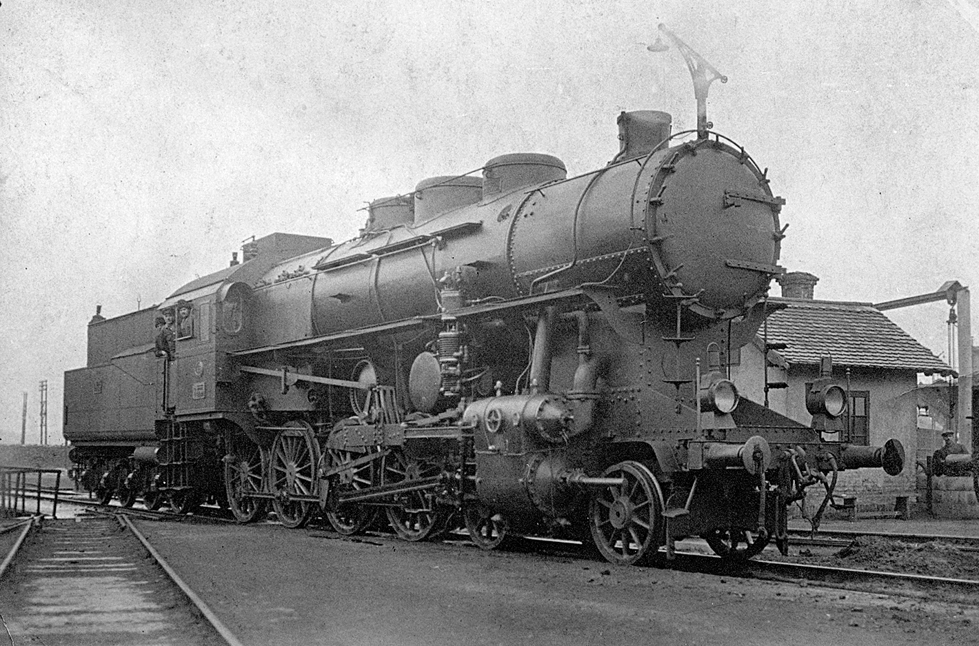 424-es szerkocsis gőzmozdony. Tags: steam locomotive, Hungarian Railways, railway, Hungarian brand, MÁV Class 424 Title: 424-es szerkocsis gőzmozdony.